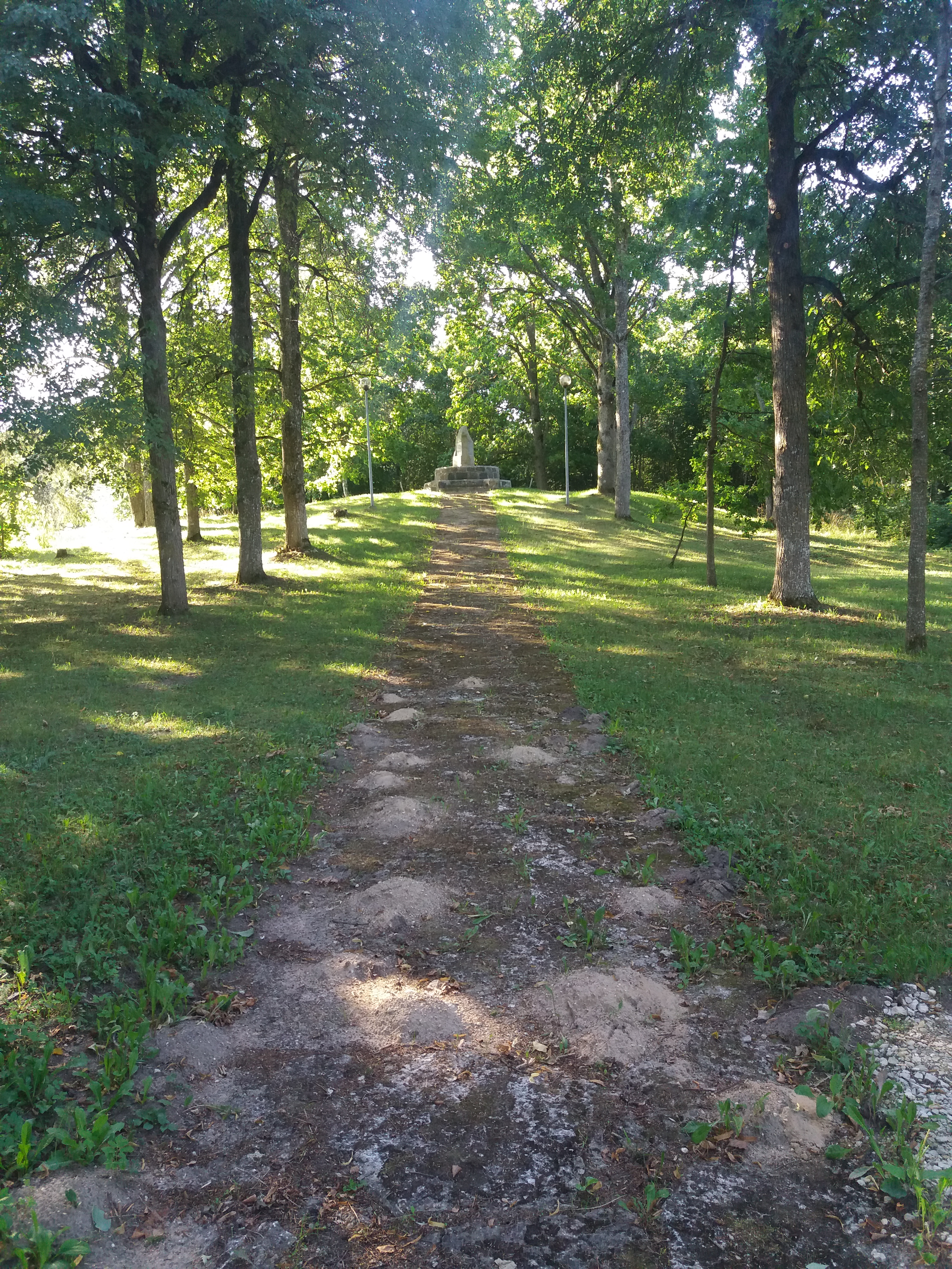 Müüsleri mälestusmärk